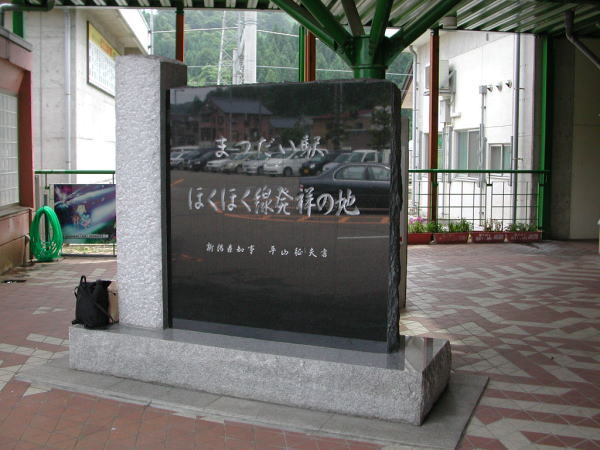 道の駅まつだいふるさと会館、ほくほく線発祥の地の碑